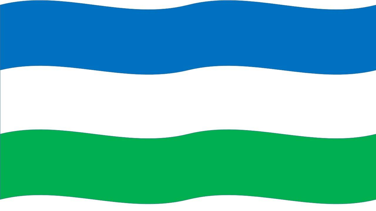 el azul es la representación de sus recursos hidrópicos, el blanco la libertad de sus tierras y el verde sus zonas boscosas